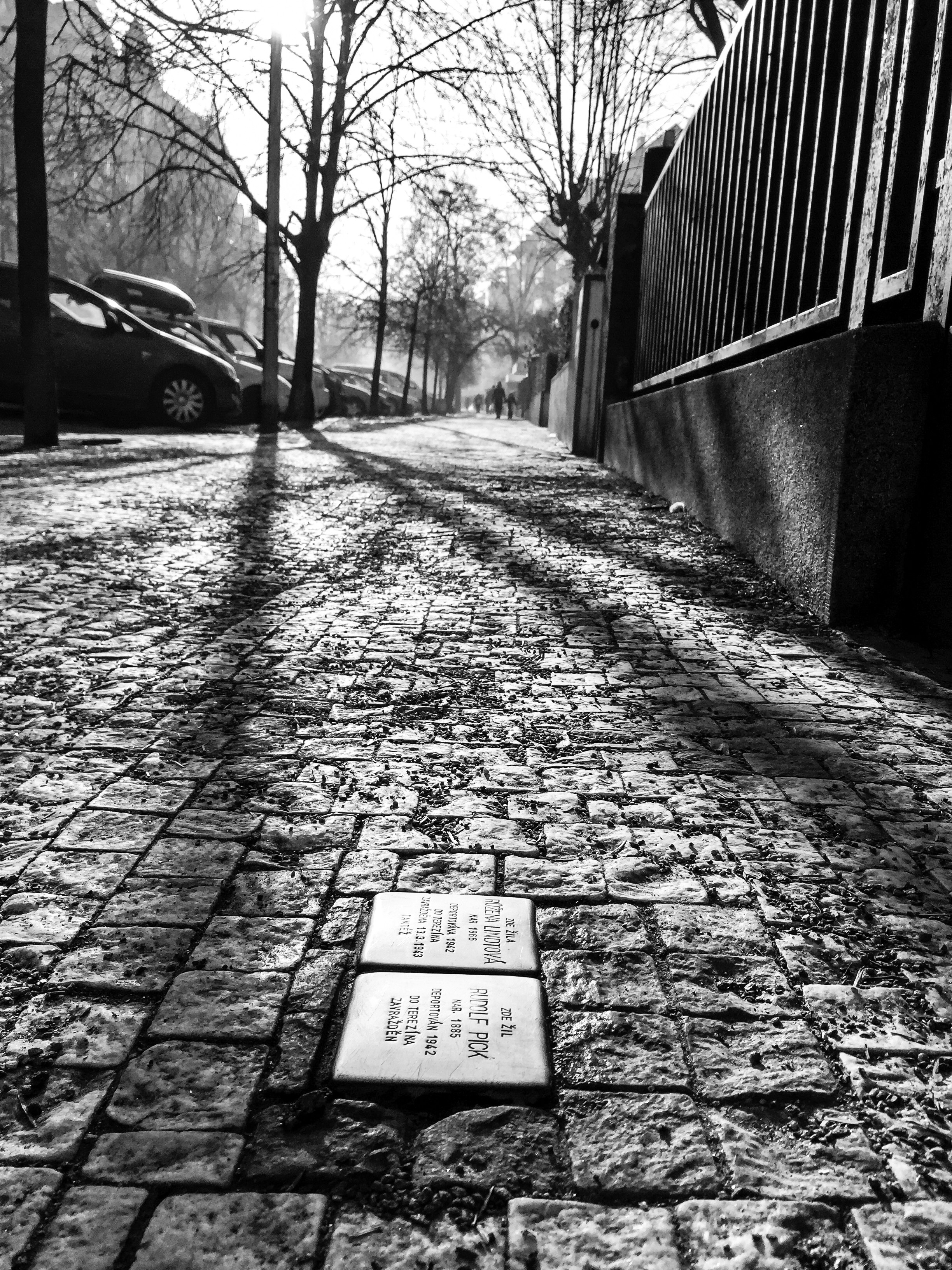 Stolperstein in Praha